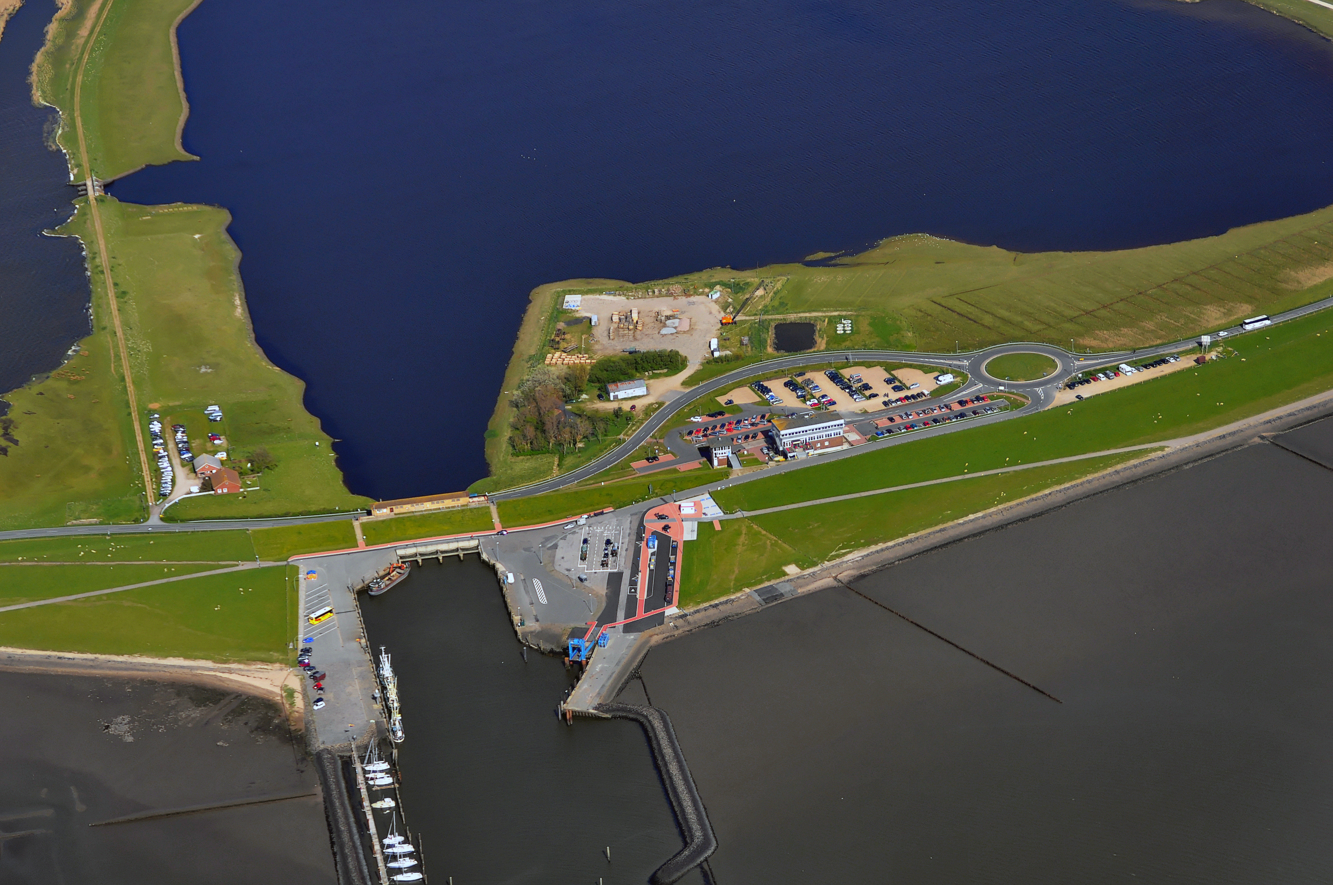 Luftbilder von der Nordseeküste 2012-05